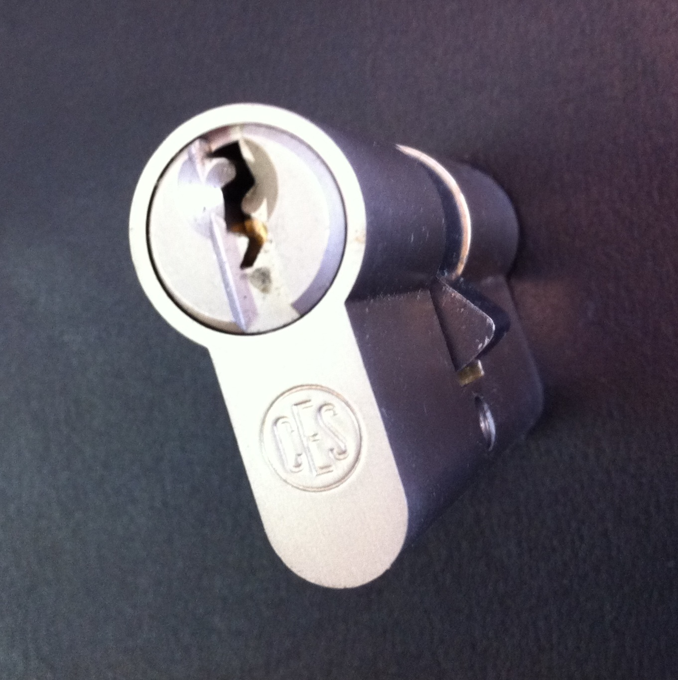 Dobbel profilsylinder